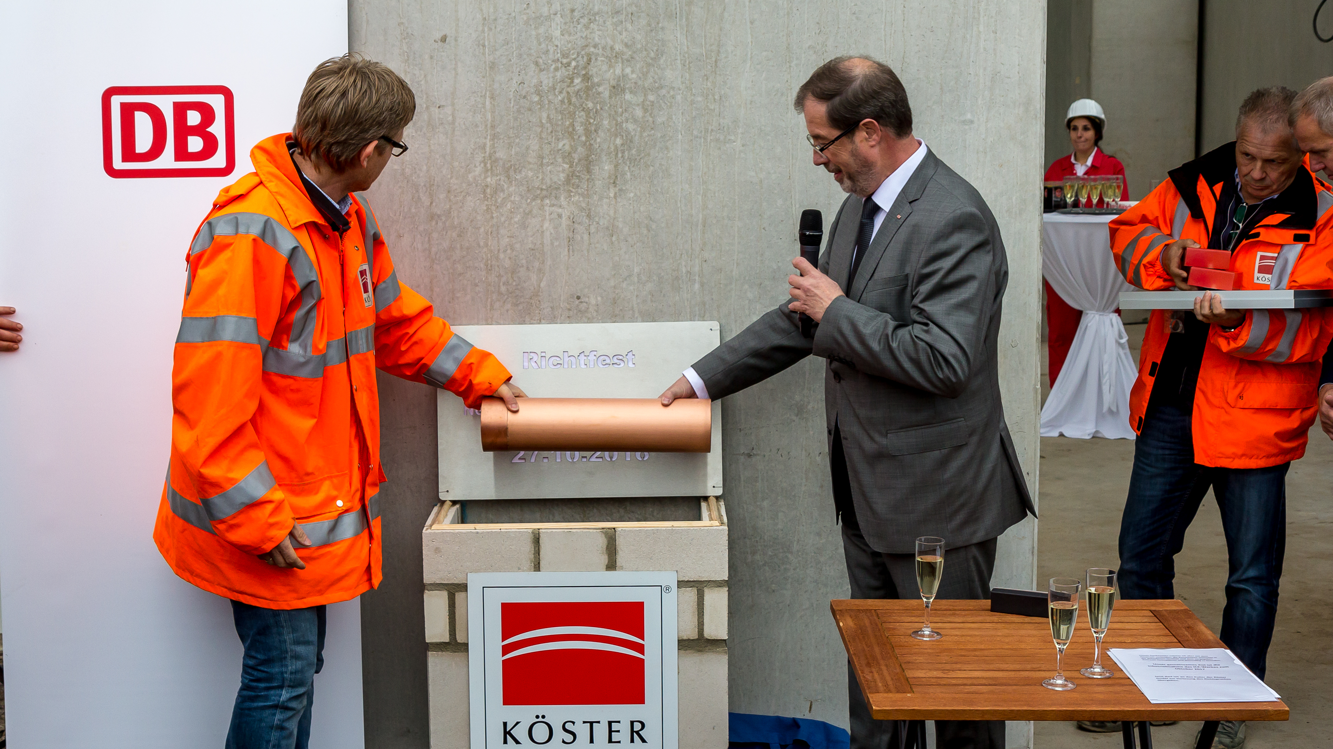 Richtfest ICE-Instandhaltungswerk Köln-Nippes